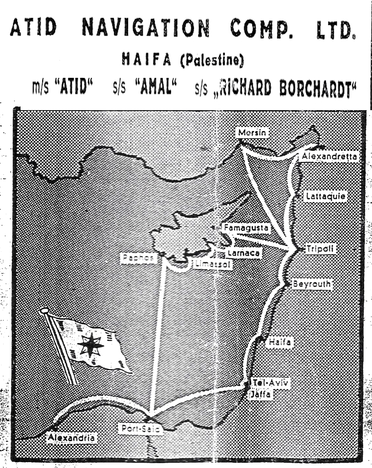 קו ספנות של חברת עתיד עם שלושת אוניותיה במזרח הים התיכון 1937